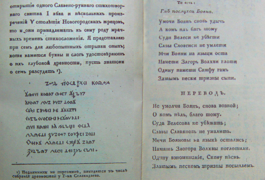 Первая публикация восьми строк из "Боянова гимна". Рунический текст издан Г.Р. Державиным в 1812 году в журнале "Чтения в Беседе любителей Русского слова". (г. Санкт-Петербург).